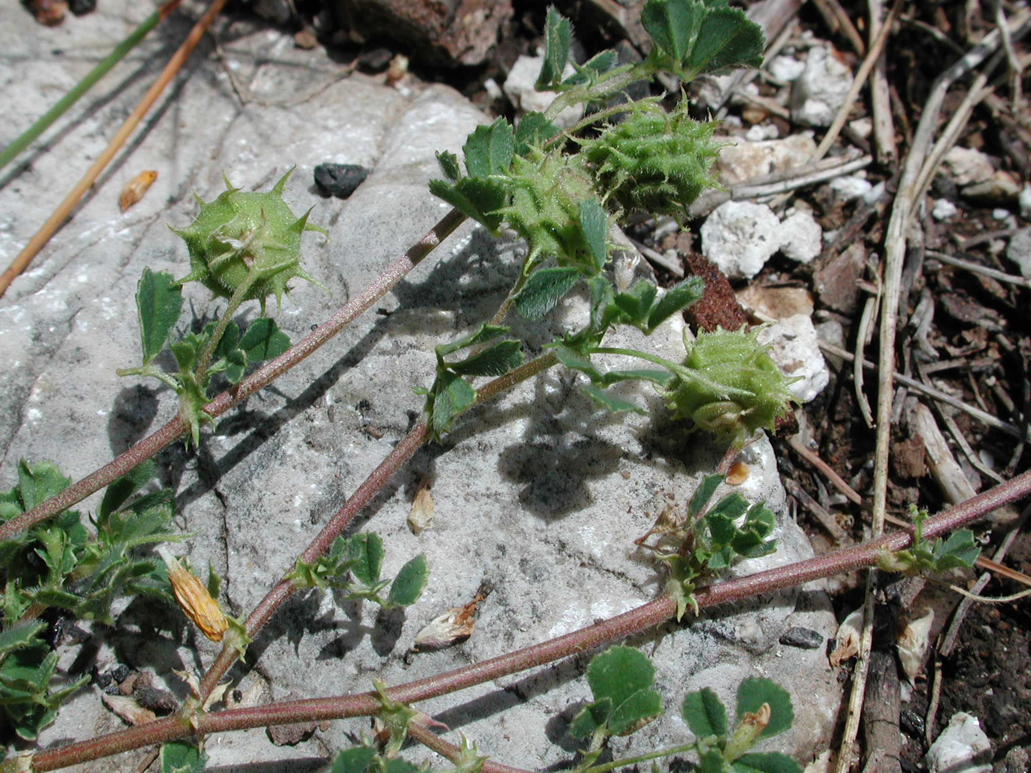 rami terminali di Medicago rigidula